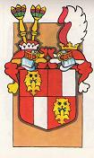 Heraldický znak rytířů z Bünau.